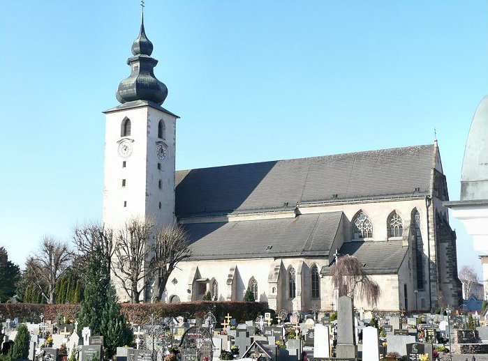 Basilika St. Laurentius